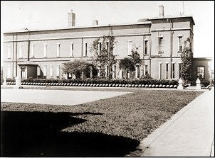 Alcatraz citadel 1893